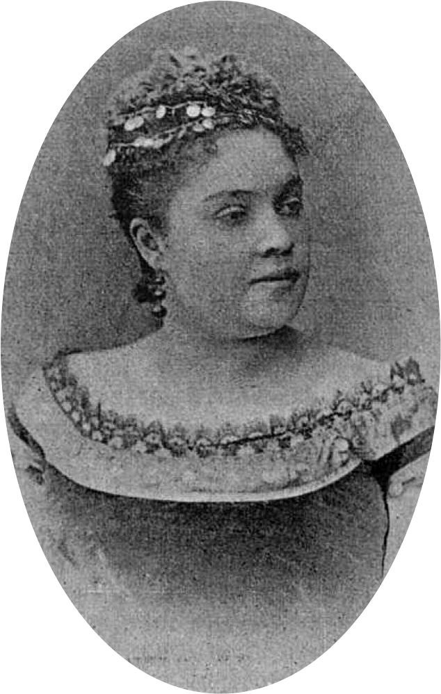 Бичурина Анна Александровна, русская оперная певица